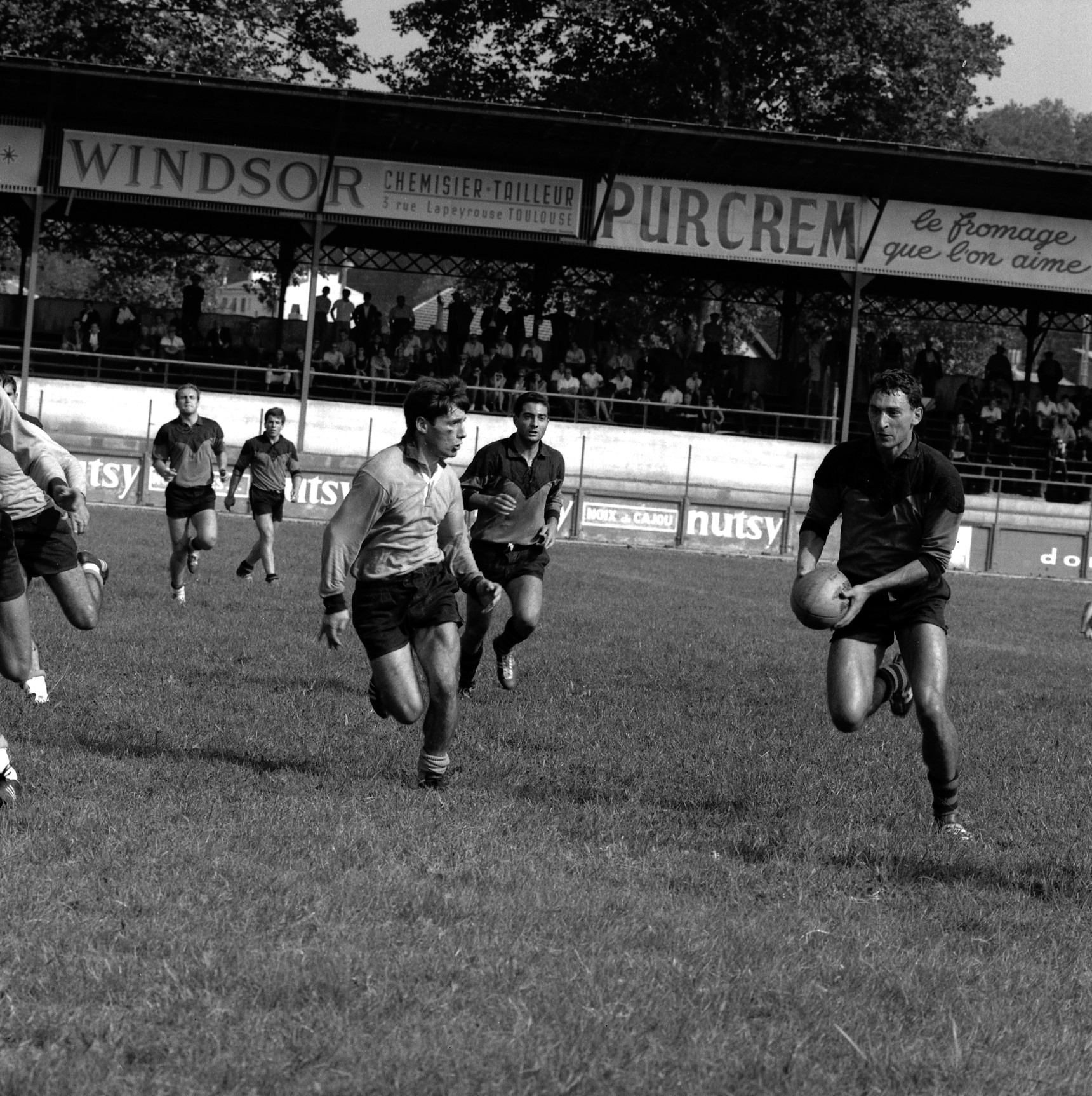 Stade Ernest-Wallon. Le 11 Septembre 1966. Vue de Pierre Villepreux, joueur du Stade Toulousain, lors d'une rencontre.